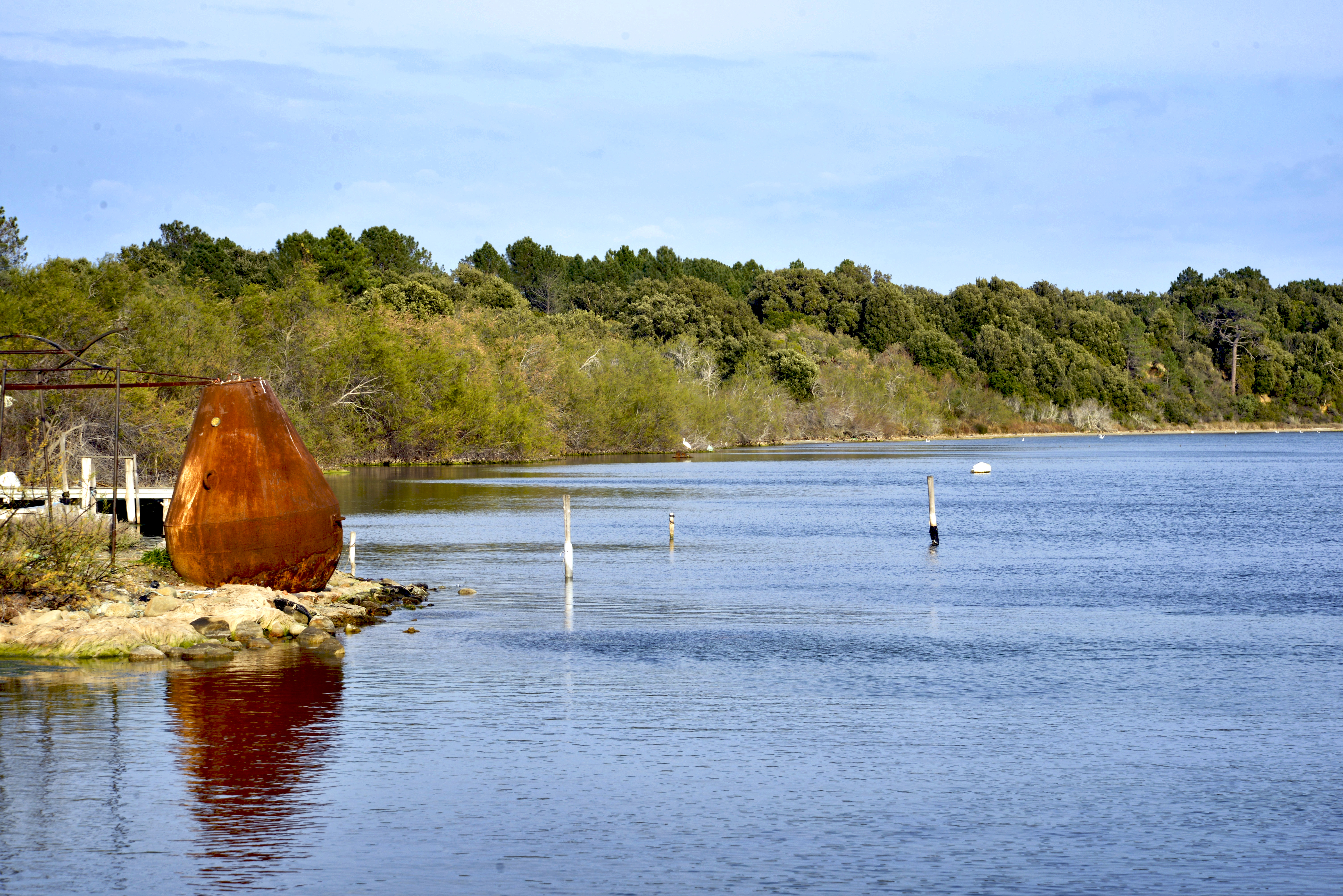 Ghisonaccia, Haute-Corse - L'extrémité de l'Isola longa à l'étang d'Urbino, à l'est de la ferme acquacole et du restaurant sur l'eau.